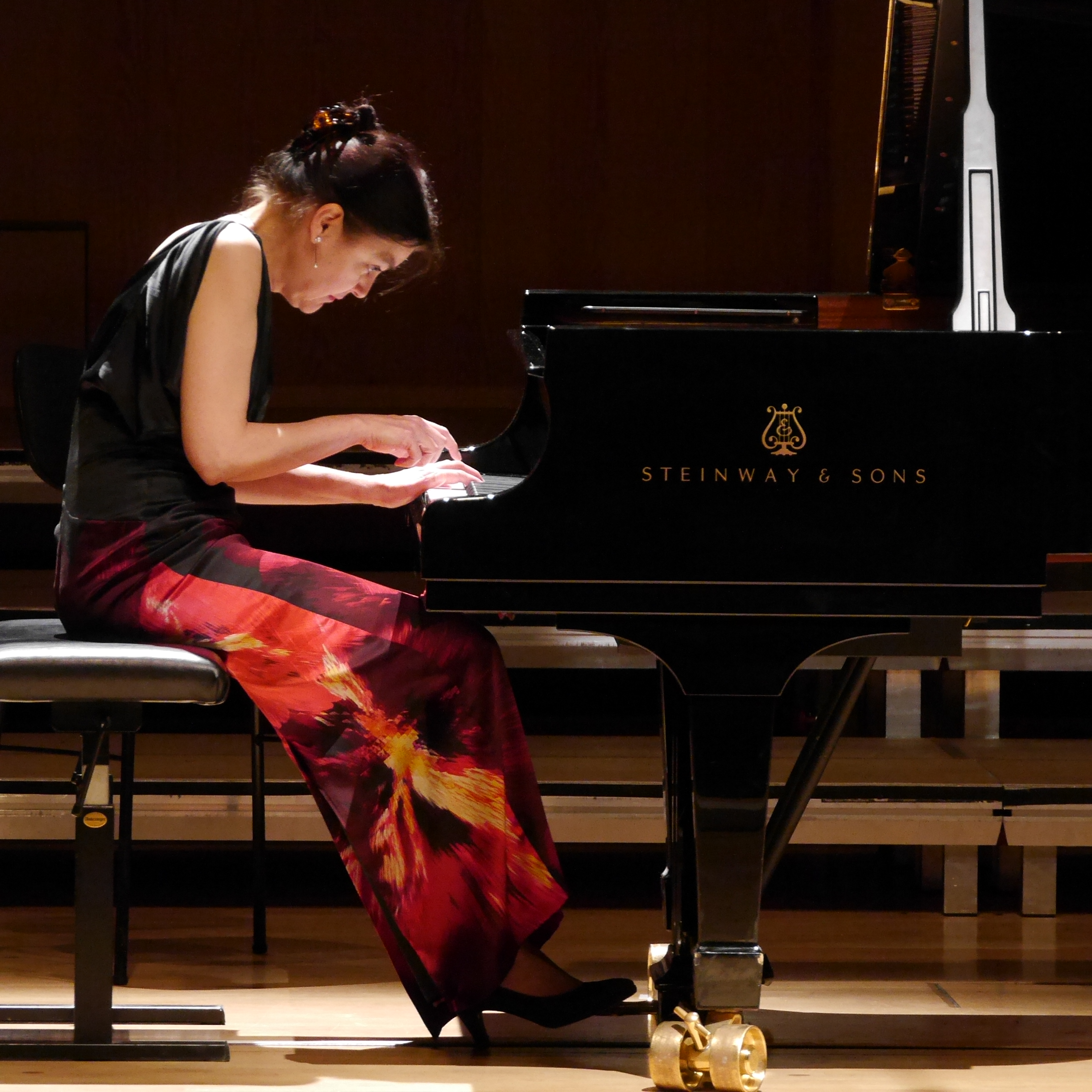 Heidrun Holtmann. Ehrenkonzert zum 90. Geburtstag von Prof. Renate Kretschmar-Fischer am 31.05.2015 im Konzerthaus der HfM Detmold.